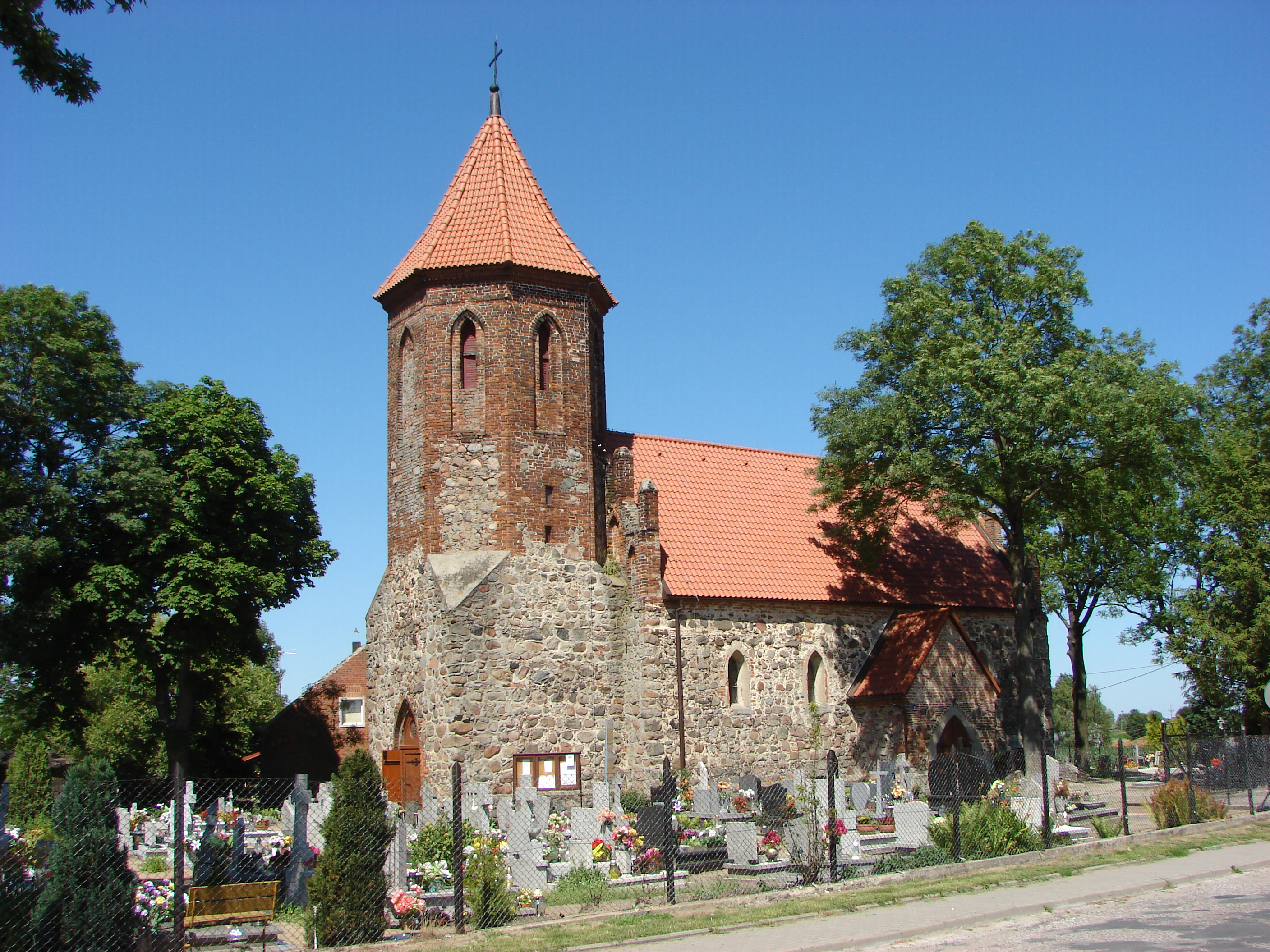 Brudzawy – wieś w Polsce położona w województwie kujawsko-pomorskim, w powiecie brodnickim, w gminie Bobrowo.